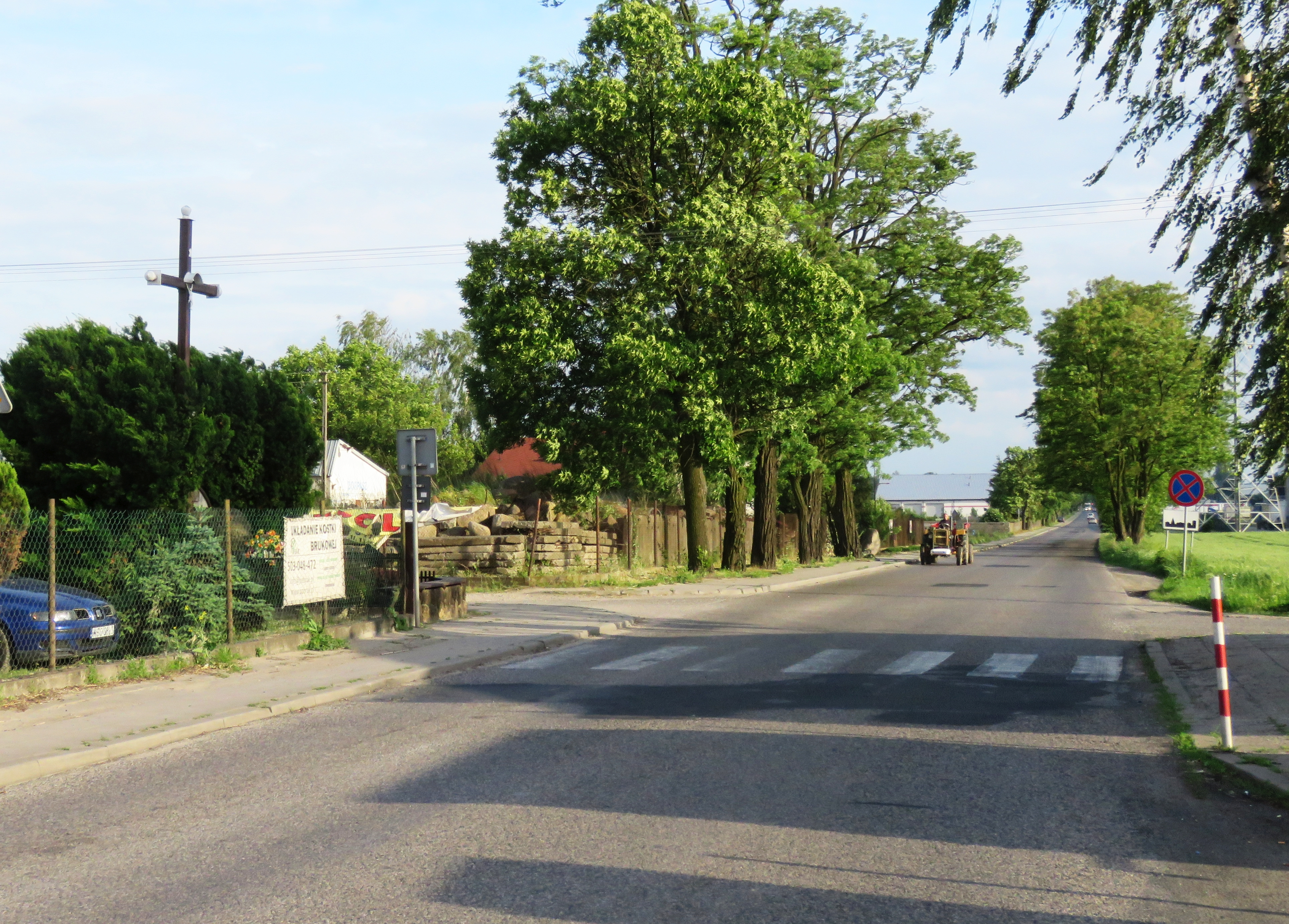 Topołowa